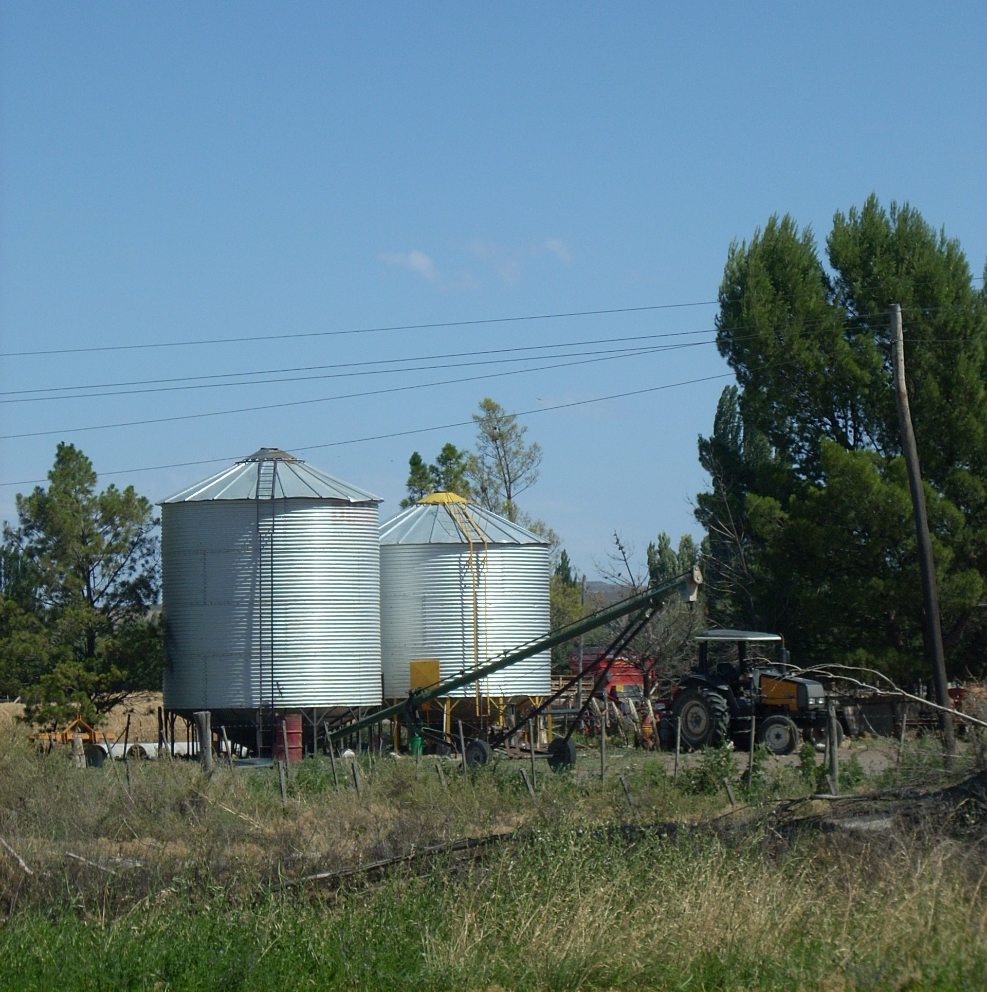 Silos en el valle inferior del río chubut